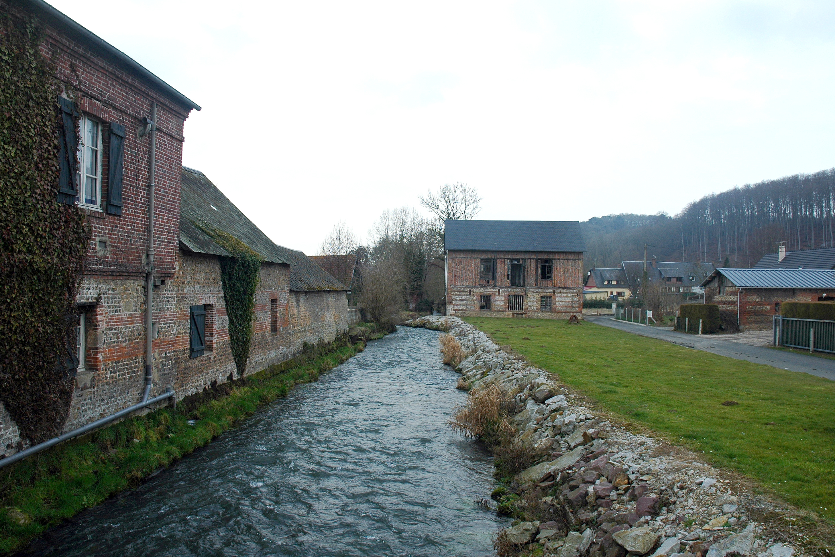 Grainville-la-Teinturière (Seine-Maritime, France) Le moulin.